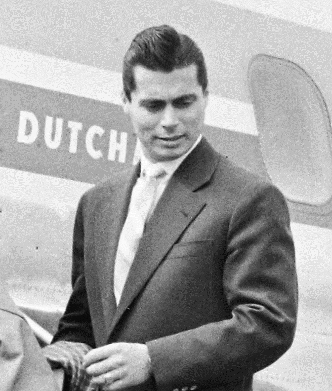 Sárosi László 46-szoros magyar válogatott labdarúgó, hátvéd.